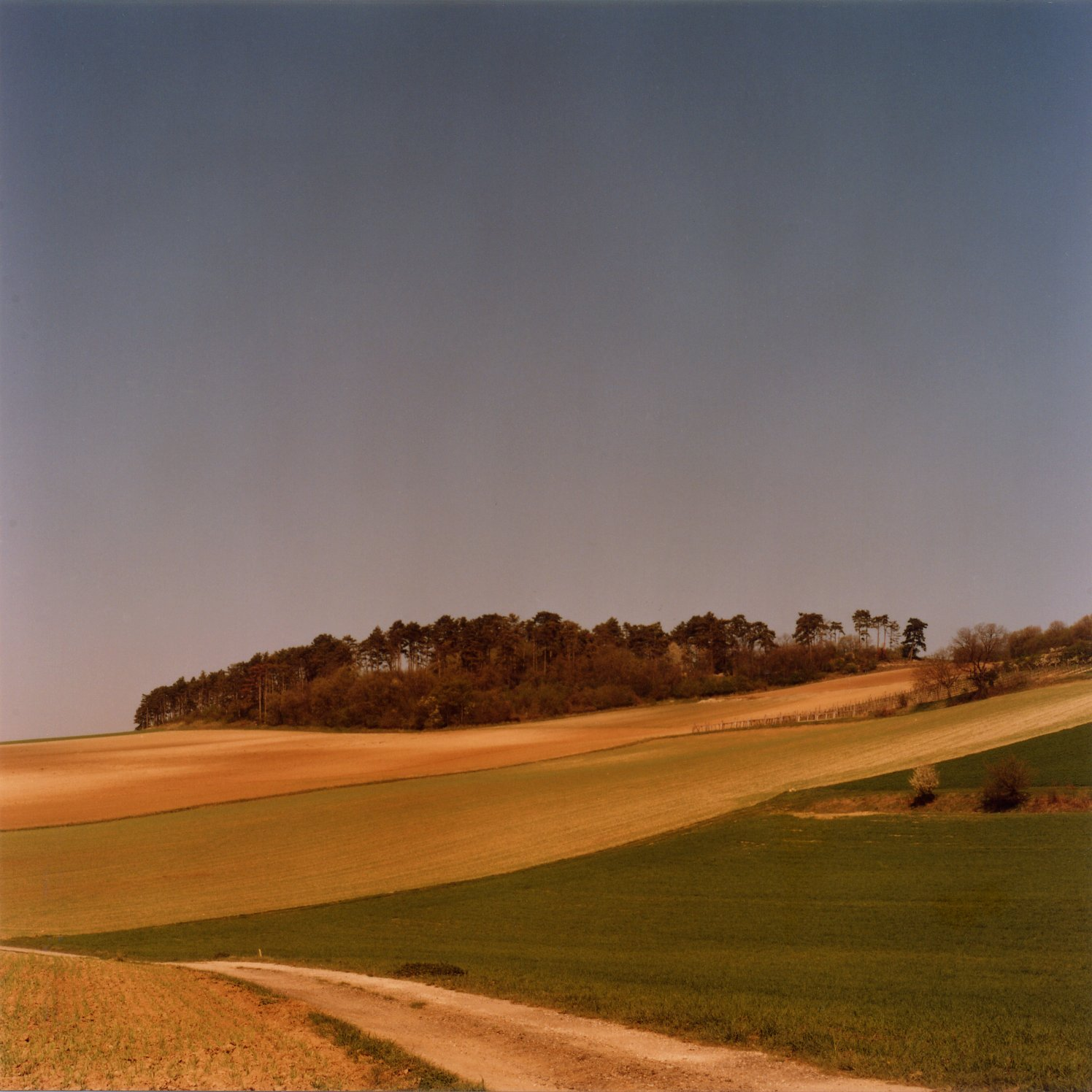 Simperlberg bei Altmanns